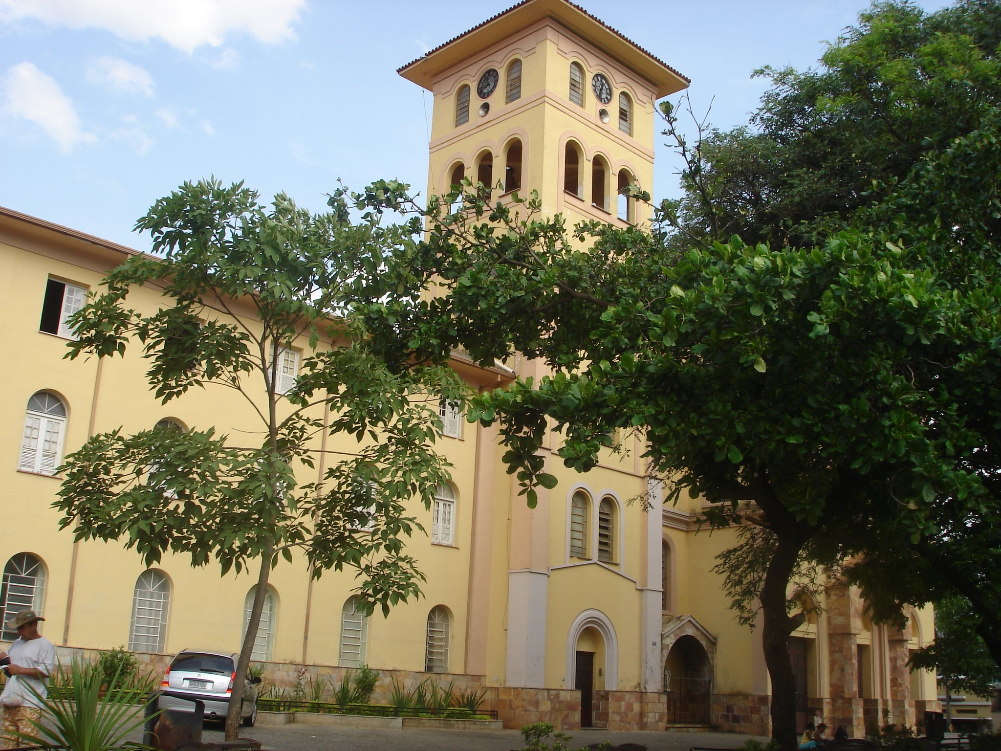 Matriz da Igreja N.S.do Rosário da Pompeia em Belo Horizonte.